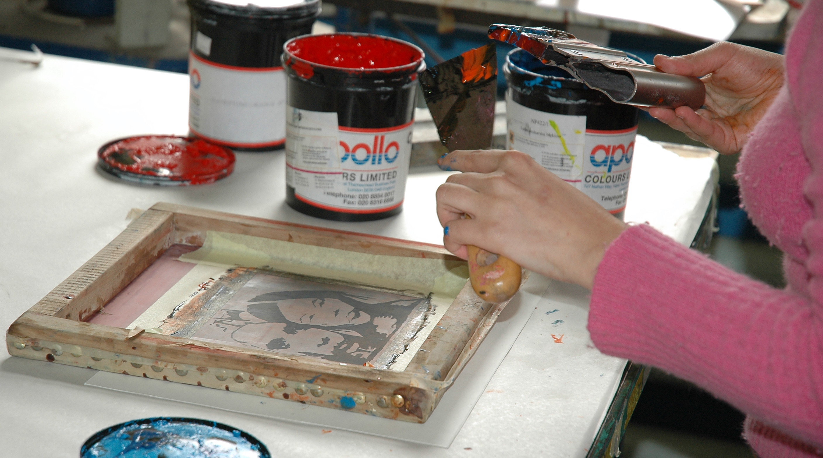 *Sujet:Seriegraphie mat Spachtel a Raclette Source:ex-Commons; Foto: Have been made by Martin Karvos during summer 2005. Photo comes from foto archive